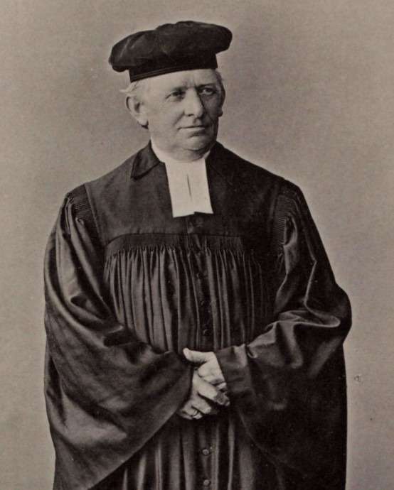 Hornjoserbsce: Delnjoserbski ewangelski farar a narodny prócowar Jan Bjedrich Tešnaŕ.